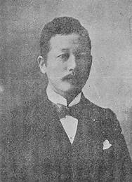 Portrait of Yamaza Enjiro (山座円次郎, 1866 – 1914)